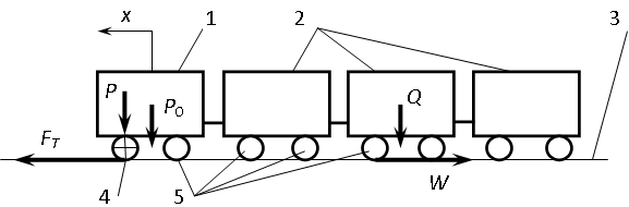 1 – локомотив, 2 – вагони, 3 – рейки, 4 – приводні колісні пари, 5 – неприводні колісні пари; х – переміщення потягу; Fт – сила тяги; W – сили опору руху потягу; Р – зчіпна вага локомотива; Ро – повна вага локомотива; Q – вага причіпної частини